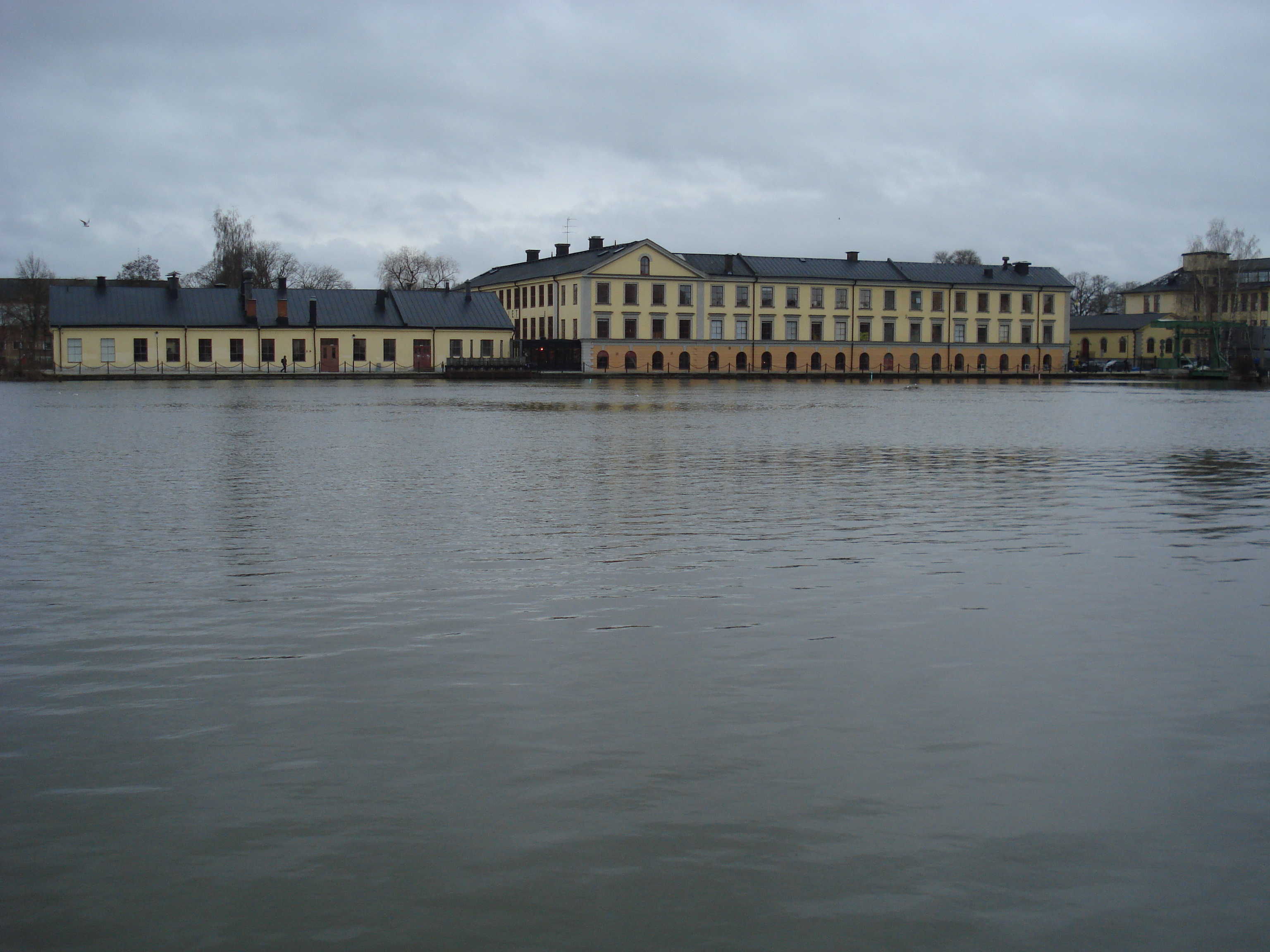 Bild på faktoriet i Eskilstuna.